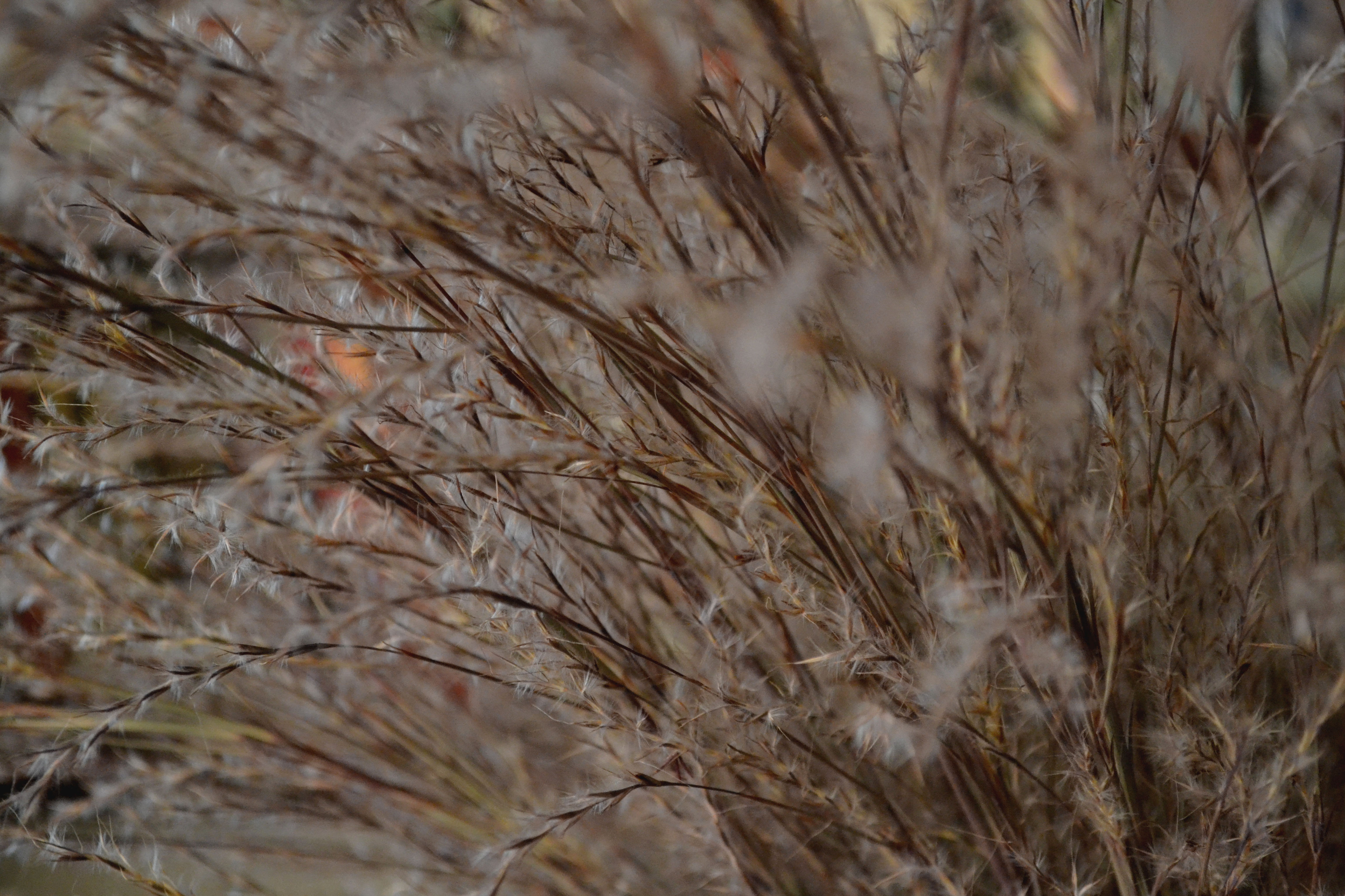 Zdjęcie wykonane za pomocą pomiaru matrycowego